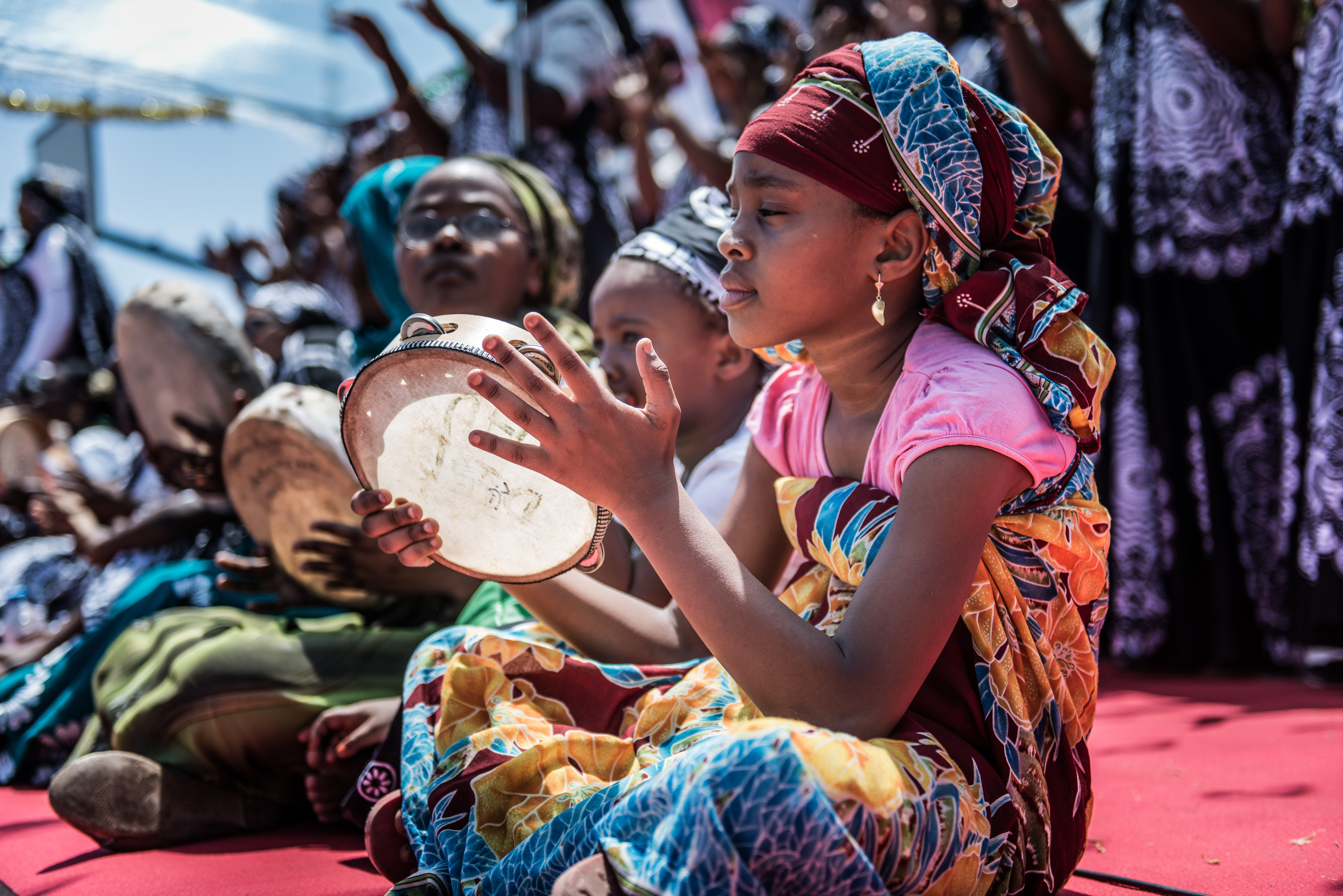 Debaa à Mayotte Le debaa est une danse traditionnelle de l'île de Mayotte réservée exclusivement aux femmes.